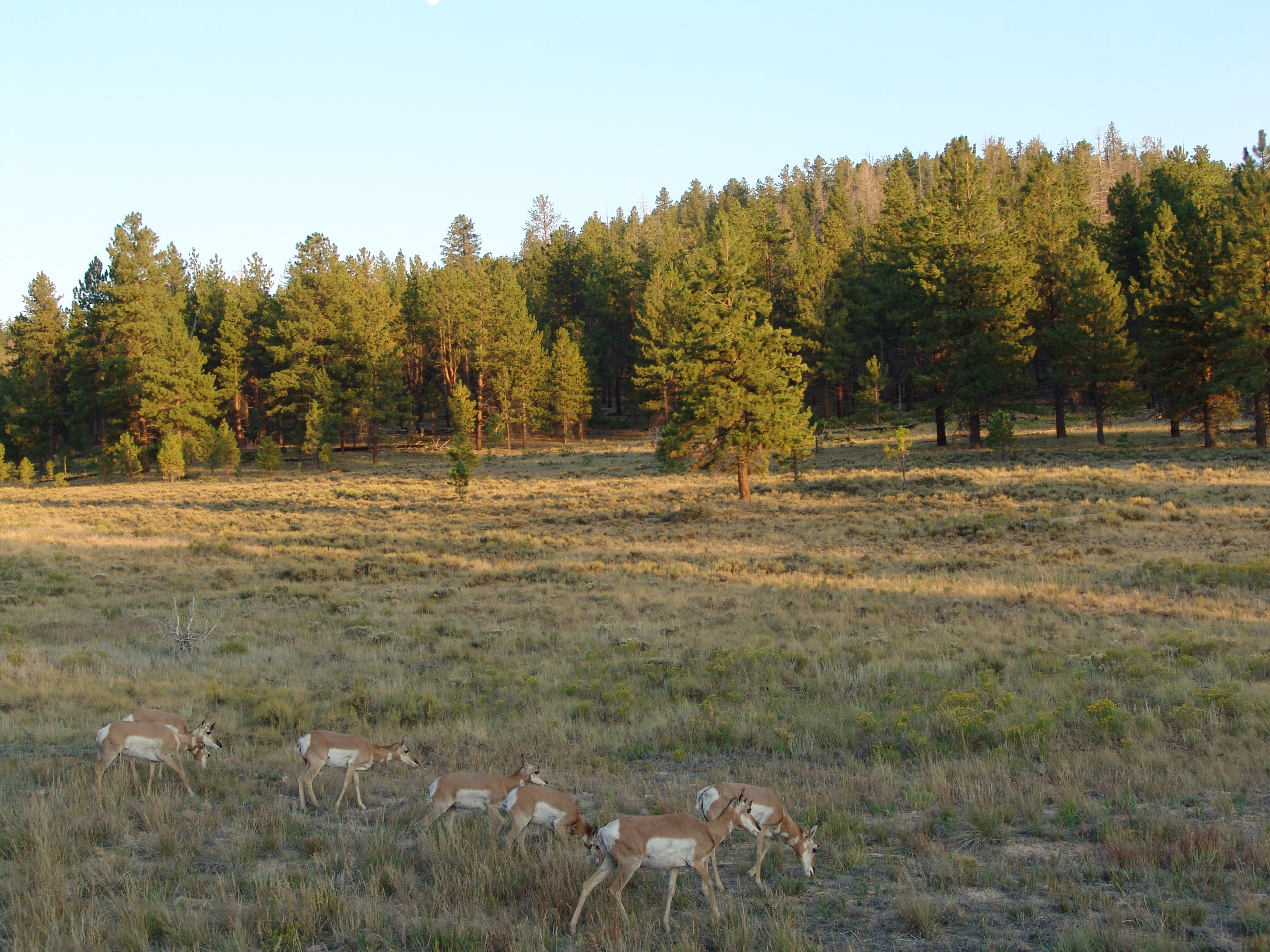 De natuur in het Bryce Canyon National Park